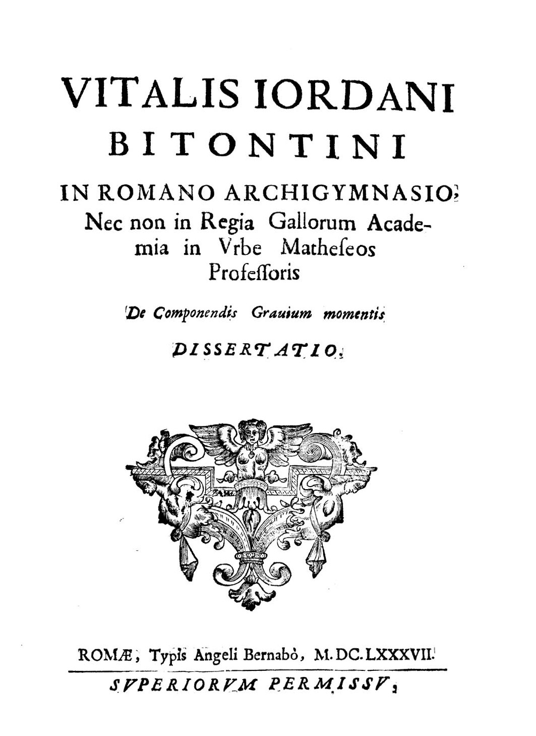 Vitalis Iordani Bitontini... De componendis grauium momentis dissertatio. - Romae : typis Angeli Bernabò, 1687. - [8], 14, [2] p. ; fol. .